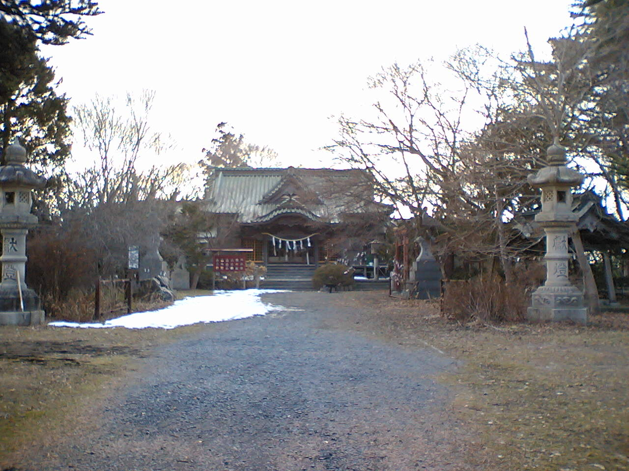 三八城神社（八戸市内丸） (MIYAGI JINJA - UCHIMARU, HACHINOHE, AOMORI, JAPAN)